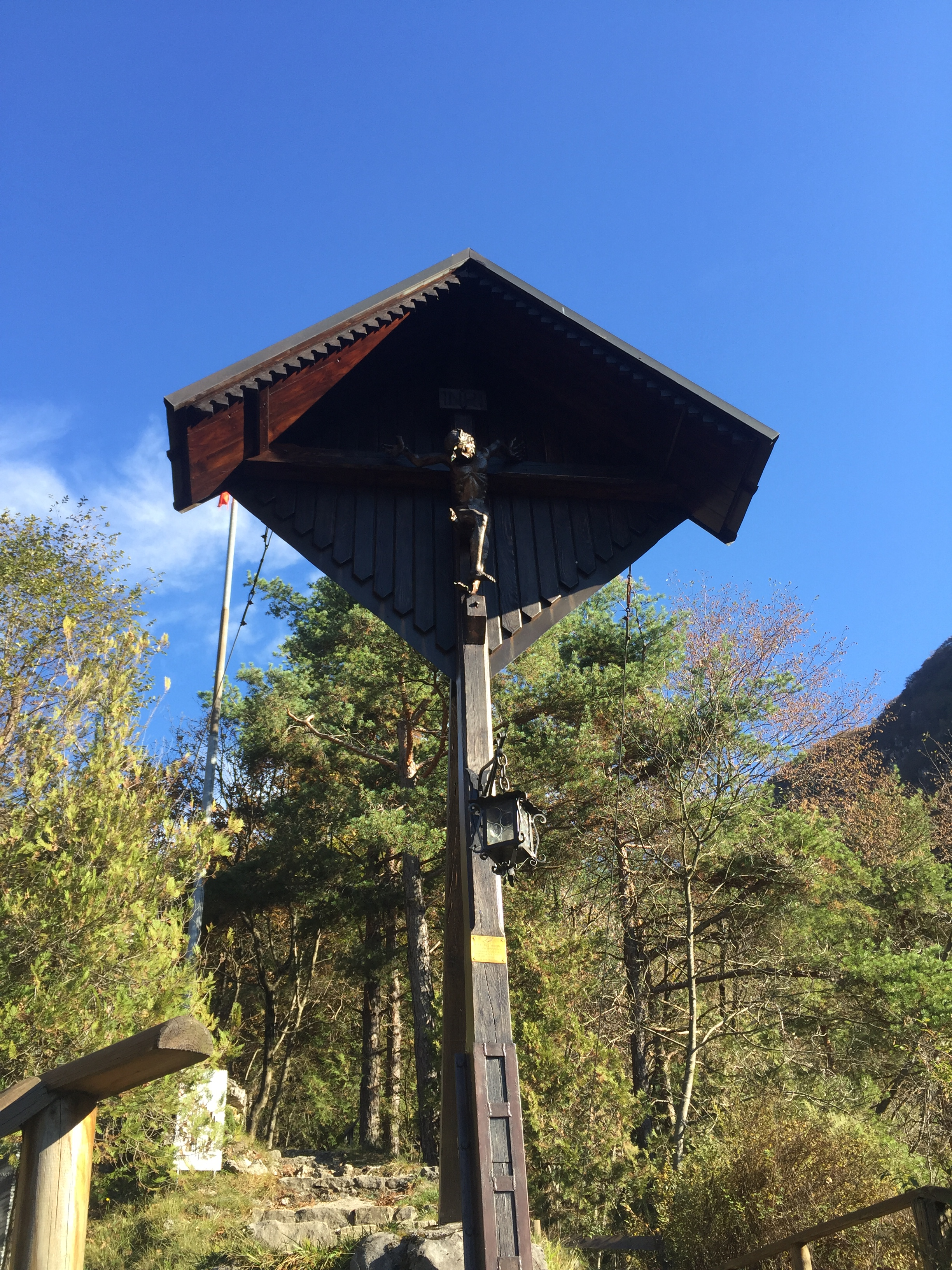 Il Cristo degli Alpini creato nel 1968